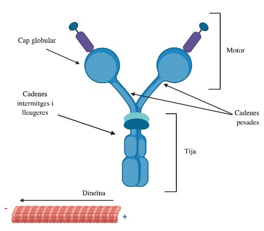 Les dineïnes són una família de proteïnes motores que participen en el moviment de flagels, així com en el transport intraflagelar.